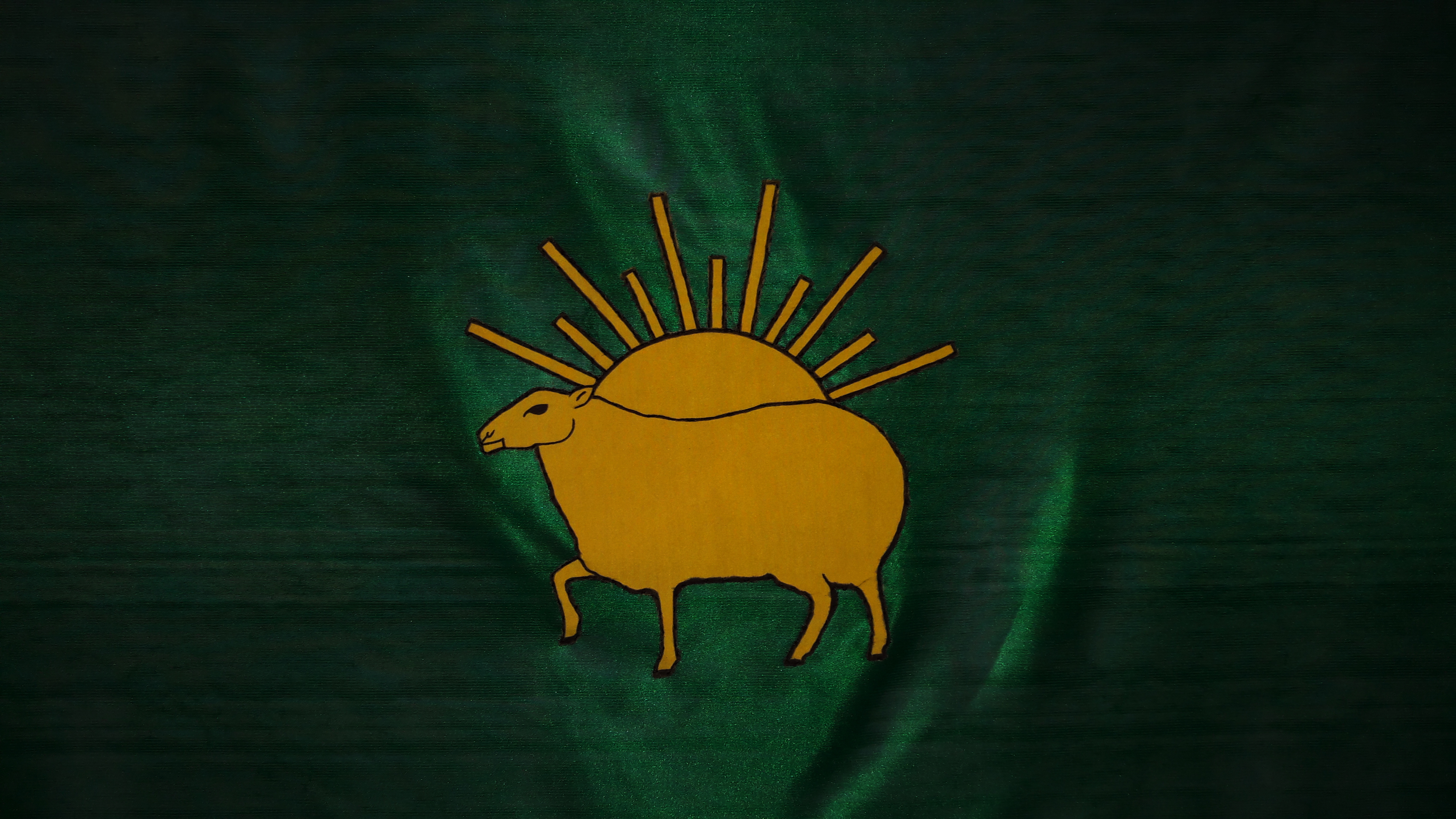 شاه تهماسپ صفوی دستور داد تا تصویر گوسپند را بر روی درفش ایران ترسیم کنند چون شاه تهماسپ زاده ماه فروردین (برج حمل) بوده است